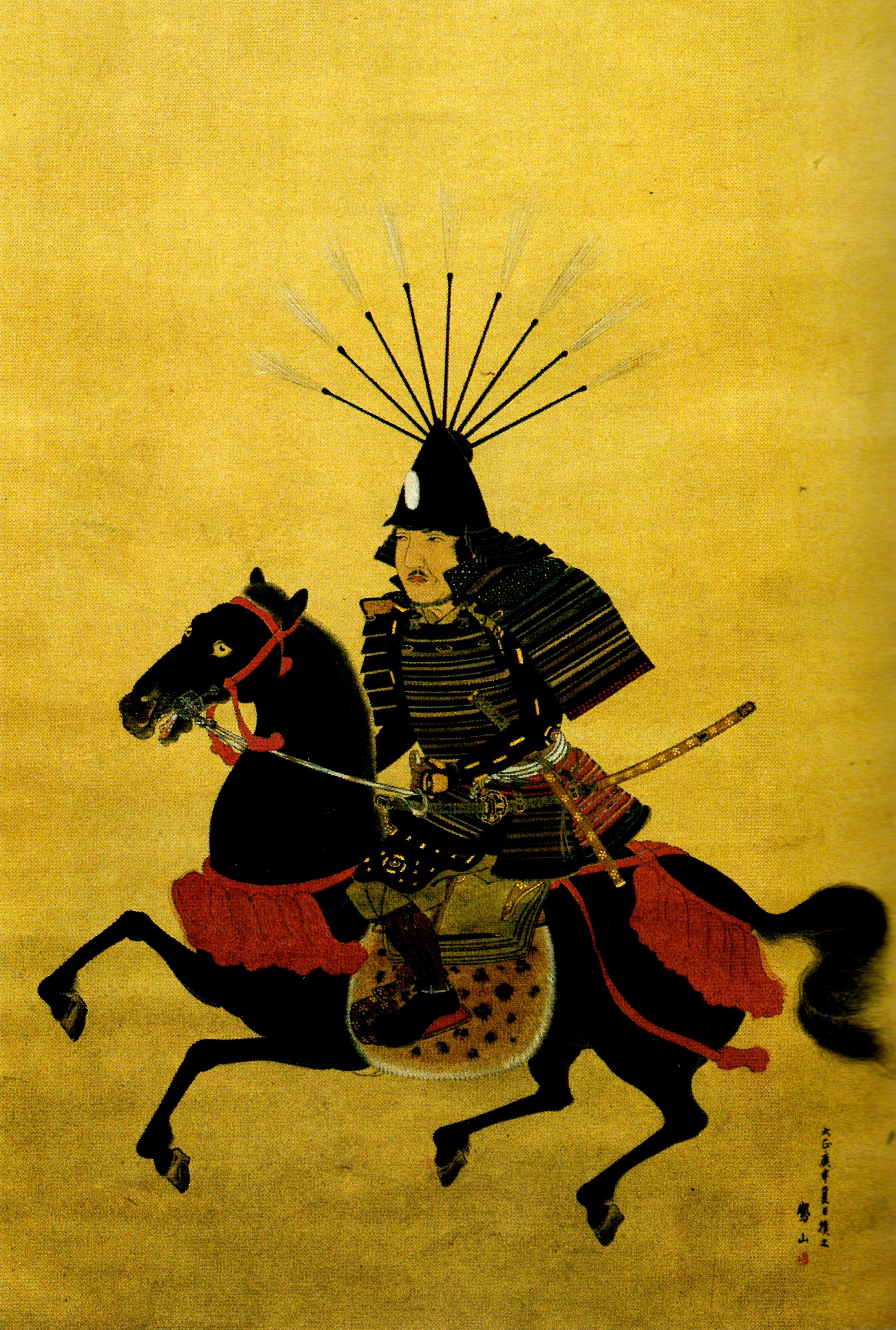 金森重頼の肖像。